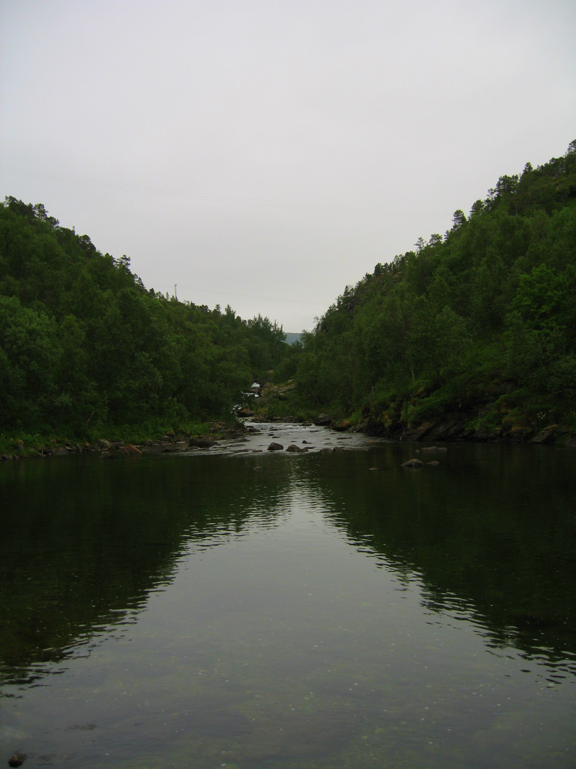 The Tennevikelva.